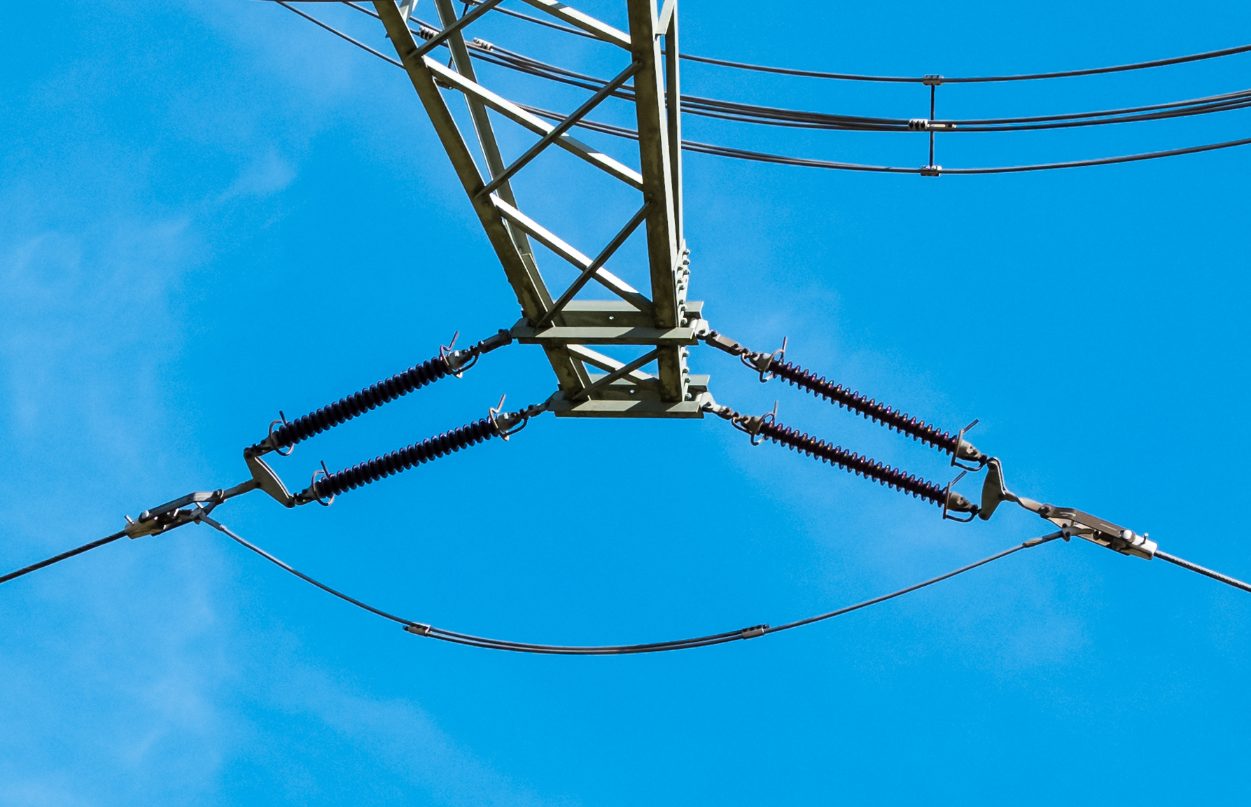 Isolatoren an einem Abspannmast einer Hochspannungs-Freileitung der EnBW (Transnet BW)